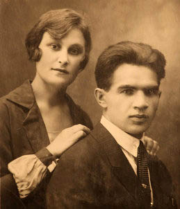 Василий Иванович и Валентина Петровна Чуйковы в день свадьбы в 1926 году